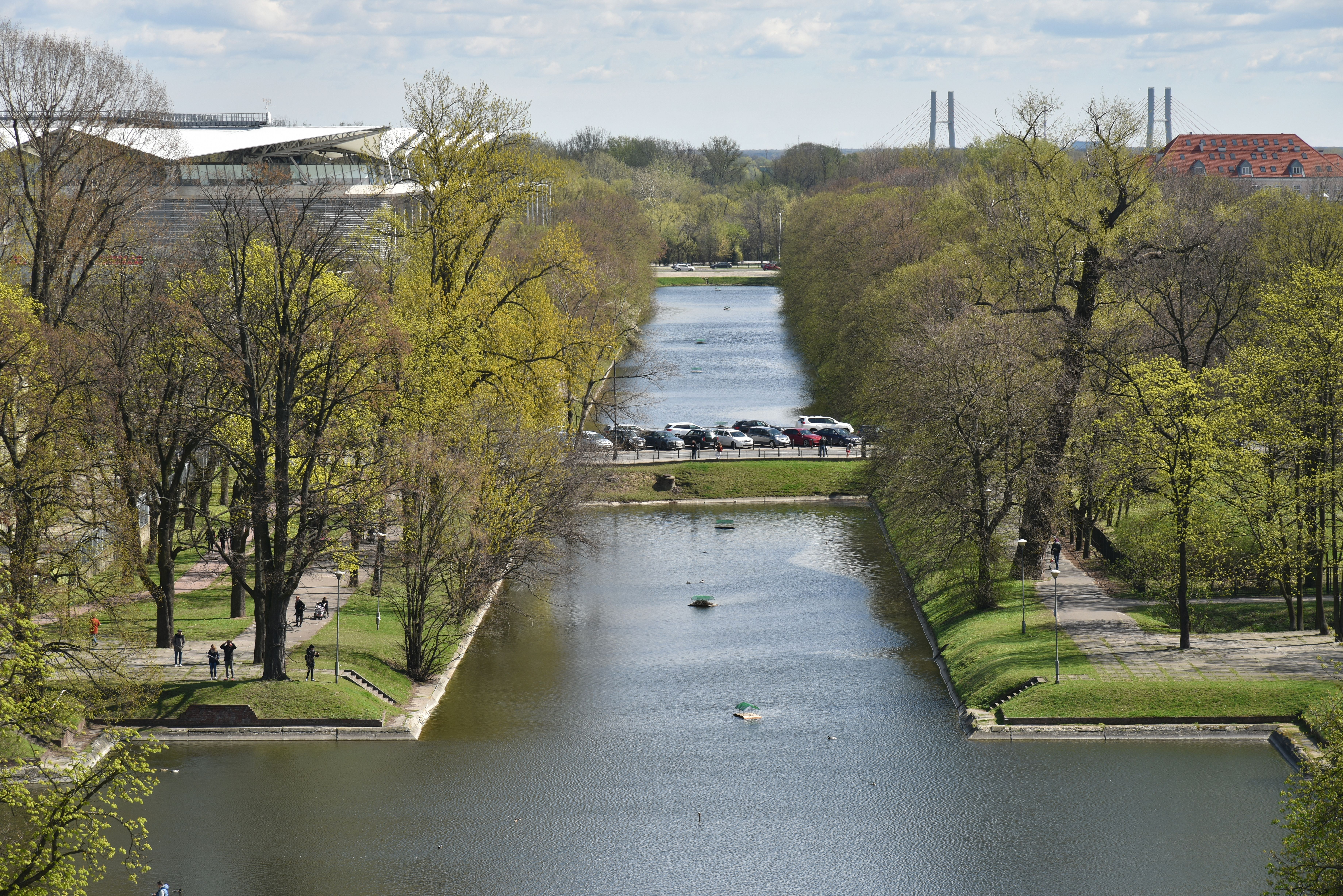 Kanał Piaseczyński widziany z tarasu Zamku Ujazdowskiego